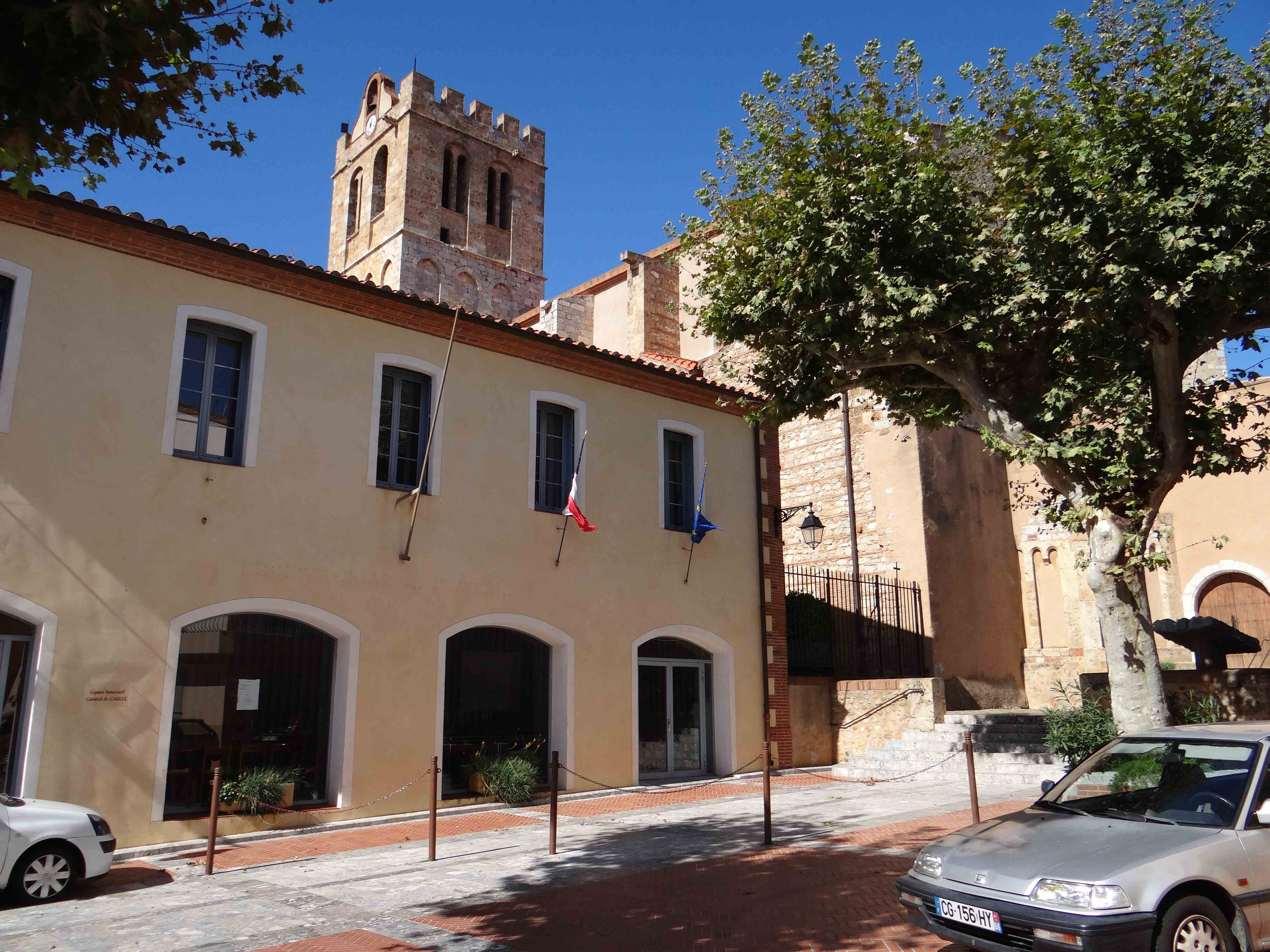 Place de la Bastille, Baixas, Pyrénées-Orientales, France.